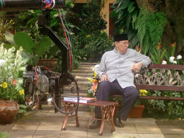 M. Quraish Shihab dalam rekaman "Kultum" di RCTI (2007)